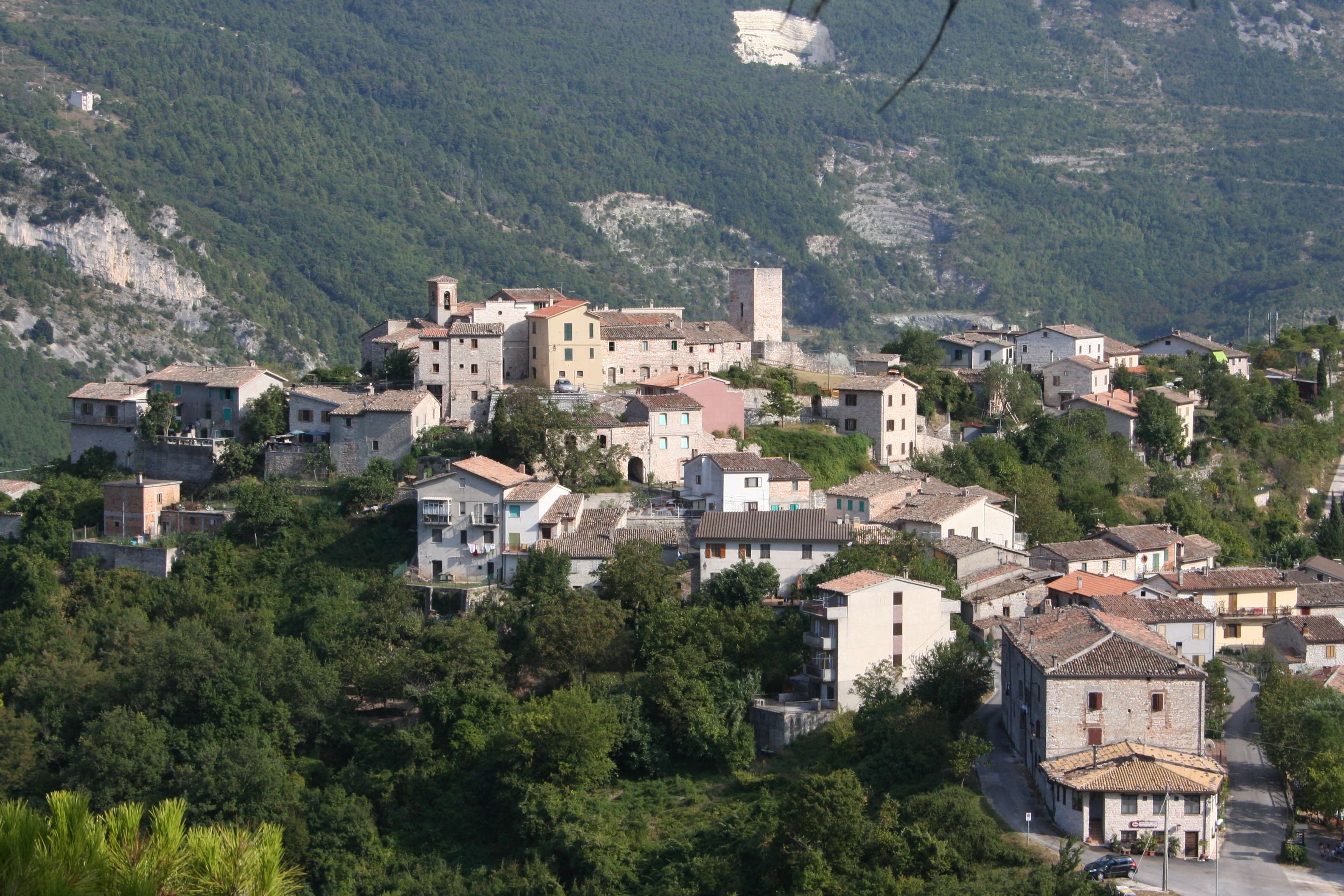 Veduta della frazione di Pierosara nel comune di Genga, provincia di Ancona, Italia.